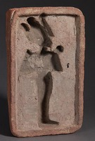 Brique funéraire destinée à mouler une image d'Osiris avec de la terre et des céréales